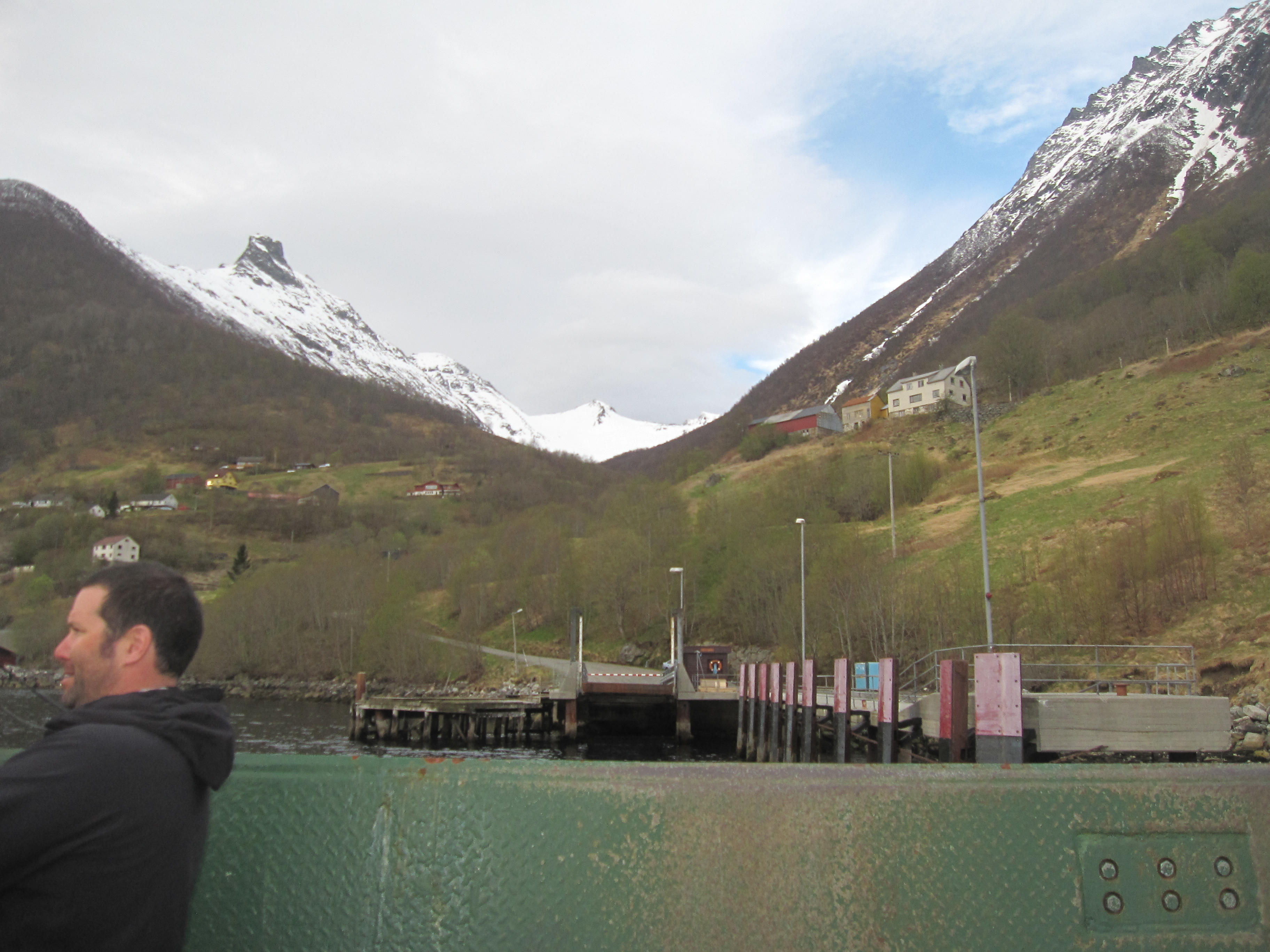 Trandalshatten (1 220 moh.) Hjørundfjorden, Møre og Romsdal, Norge